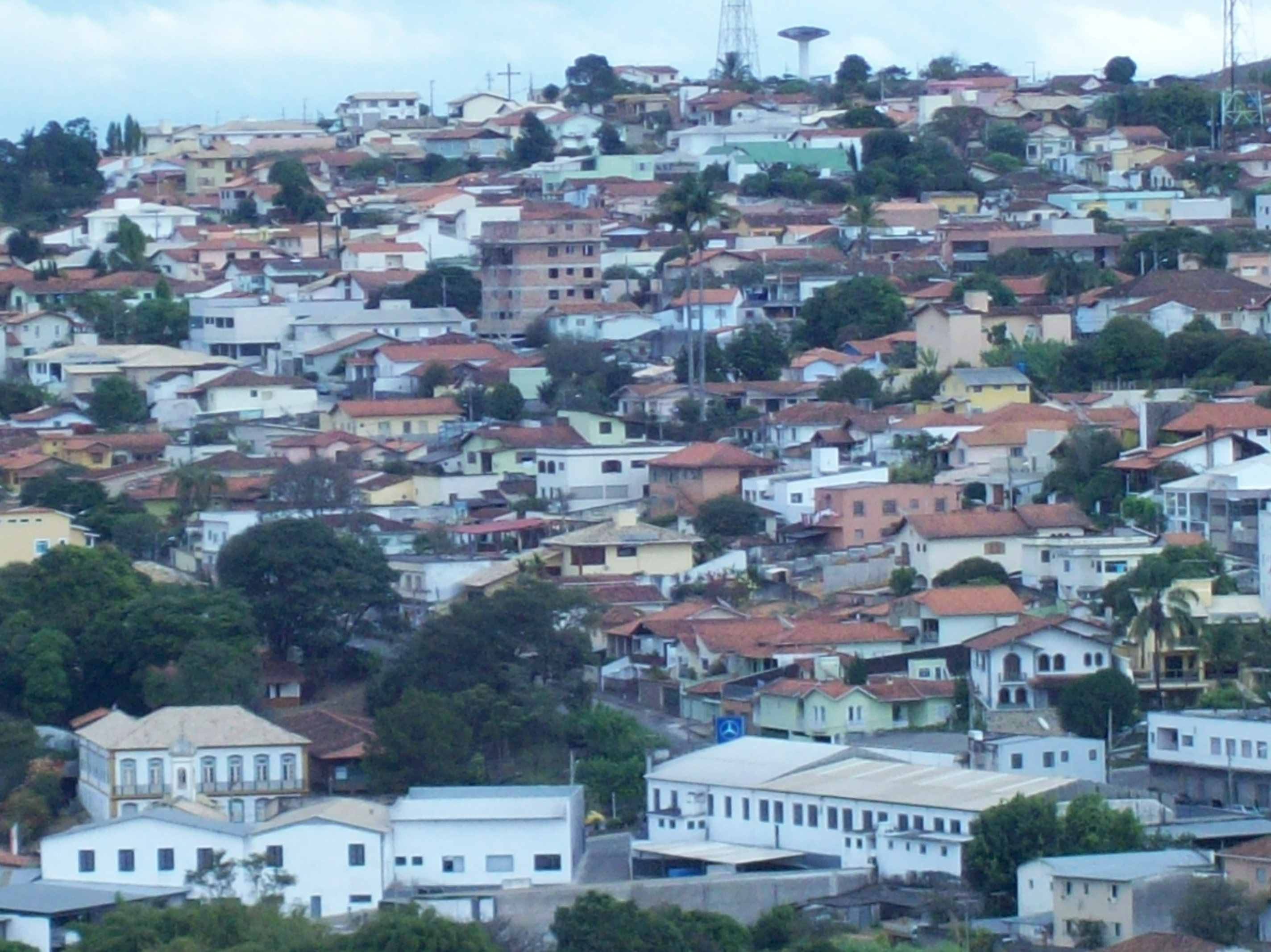 Bairro na cidade de Oliveira MG.